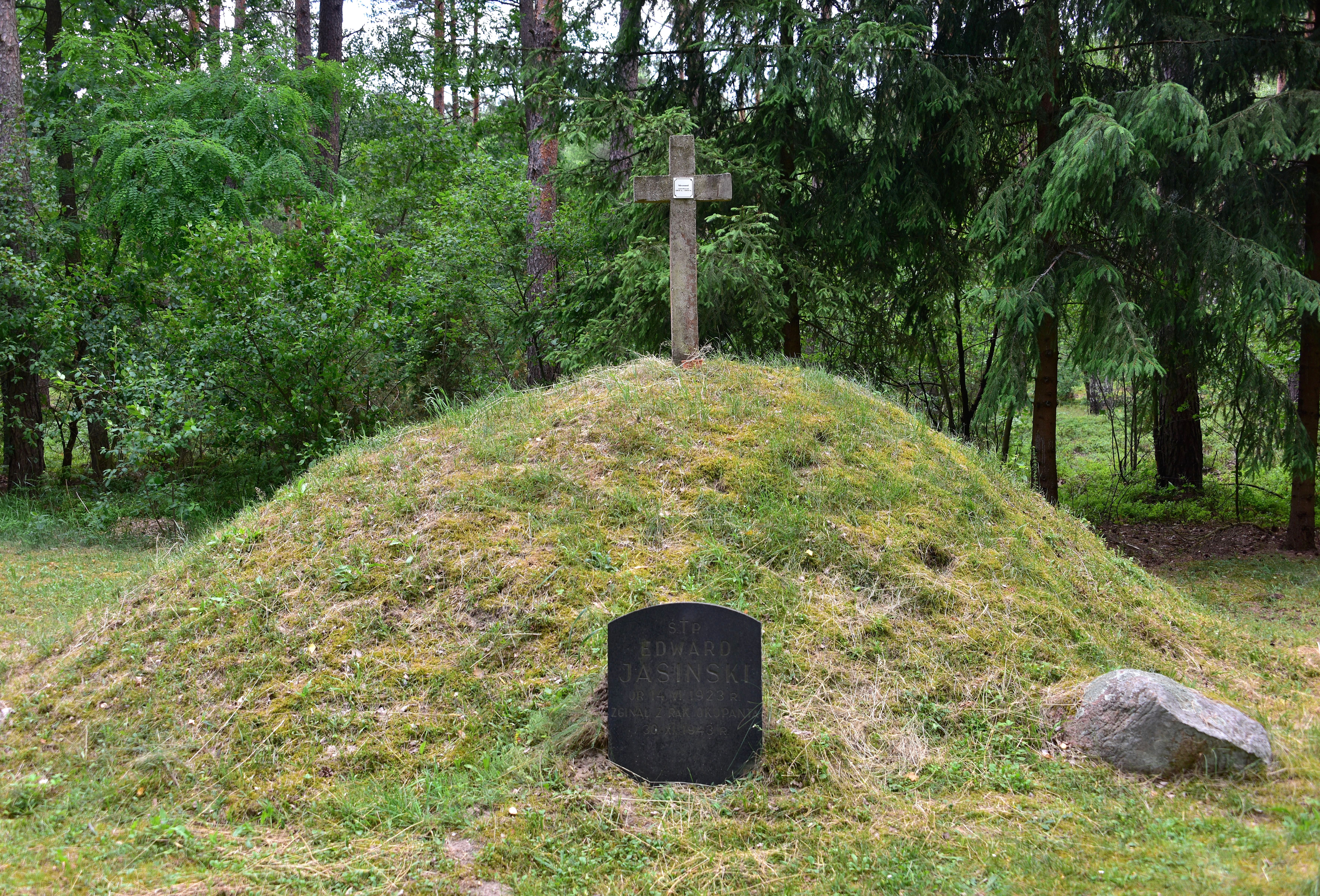 Pomnik Ofiar Obozu Pracy w Treblince